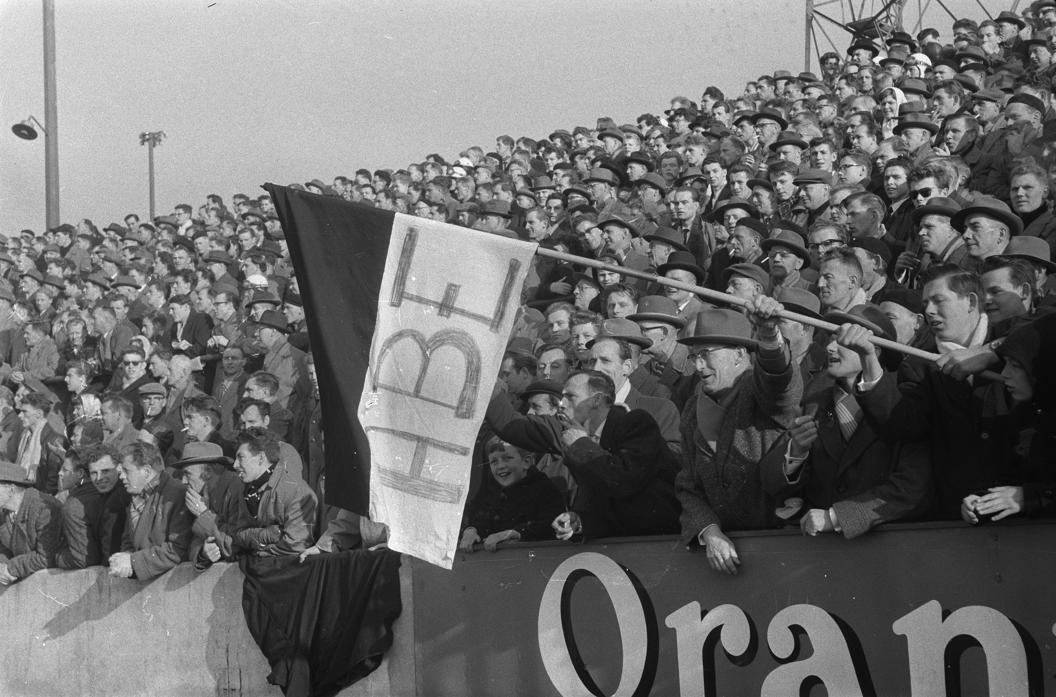 Collectie / Archief : Fotocollectie Anefo Reportage / Serie : [ onbekend ] Beschrijving : Enschede tegen Ajax 3-3, aanhangers van Abe met vlag Datum : 6 maart 1960 Locatie : Enschede Trefwoorden : aanhangers, vlaggen Persoonsnaam : Abe Instellingsnaam : AJAX Fotograaf : Pot, Harry / Anefo Auteursrechthebbende : Nationaal Archief Materiaalsoort : Negatief (zwart/wit) Nummer archiefinventaris : bekijk toegang 2.24.01.05 Bestanddeelnummer : 911-0709